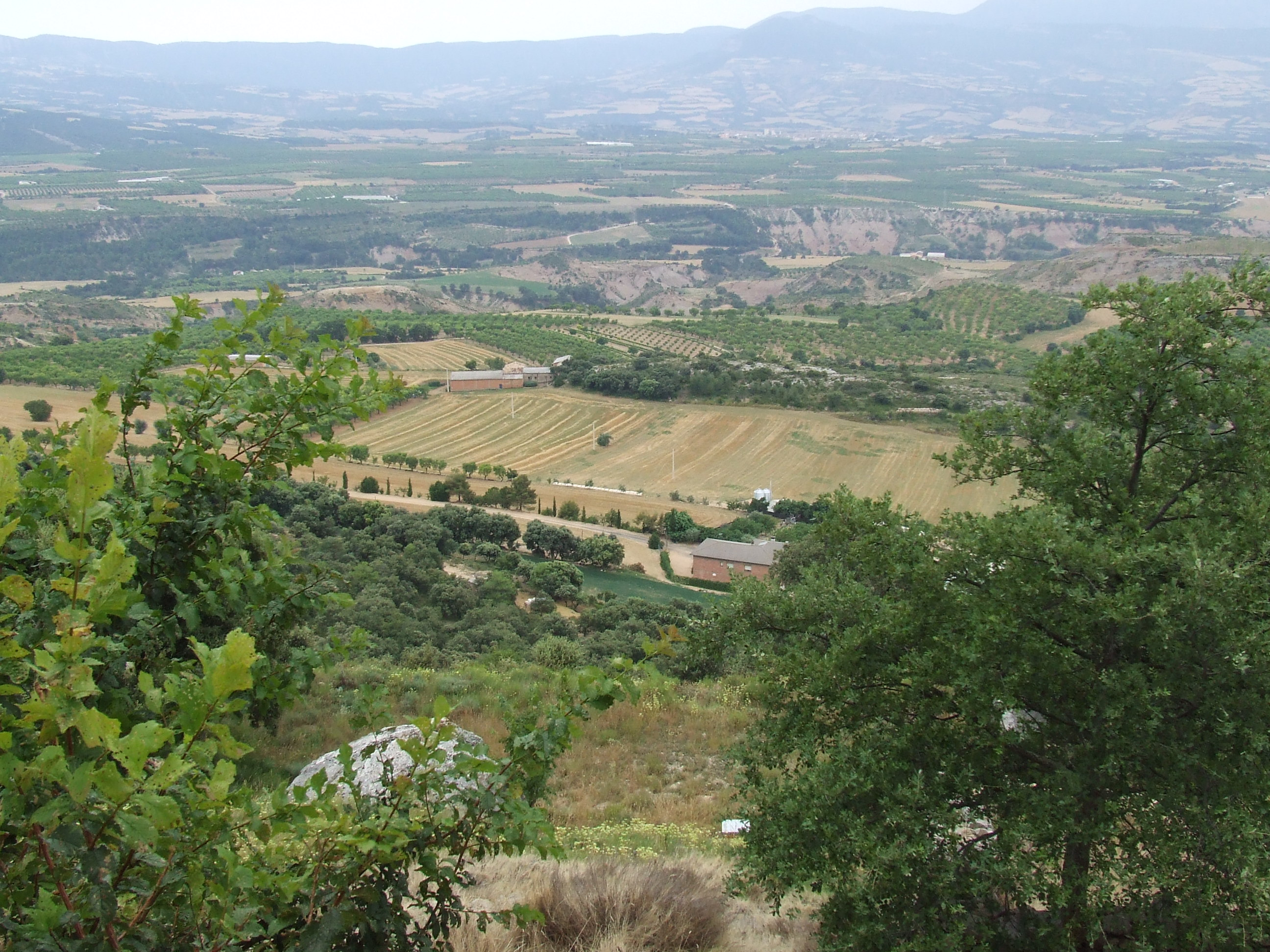 Los Planells, Casa Xinco i Cal Borrell (Abella de la Conca, Pallars Jussà)